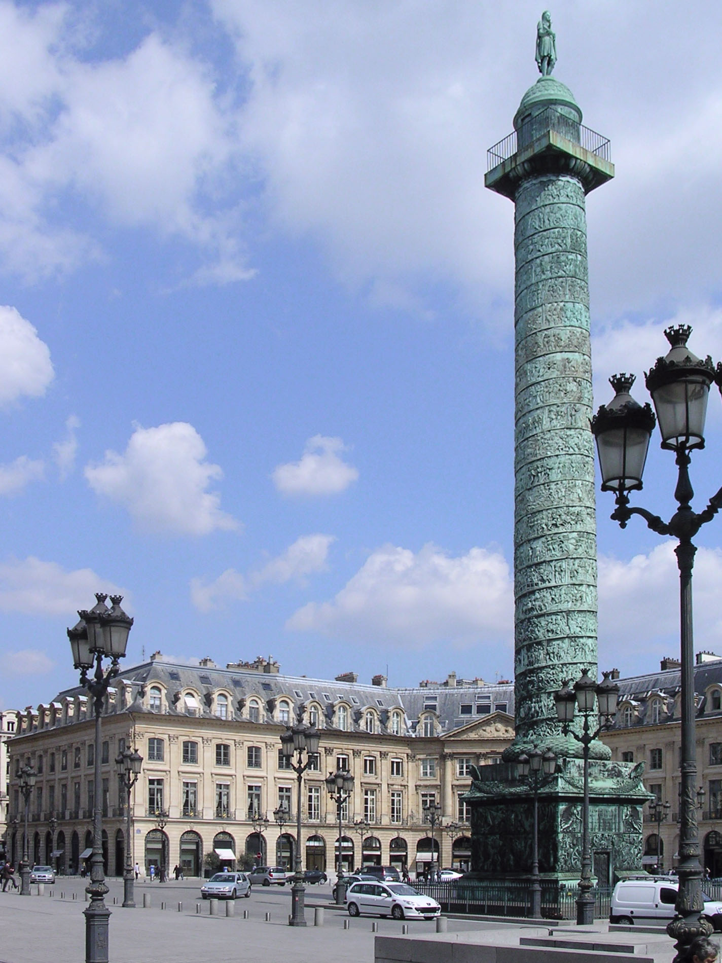 Boutique Boucheron, Place Vendôme